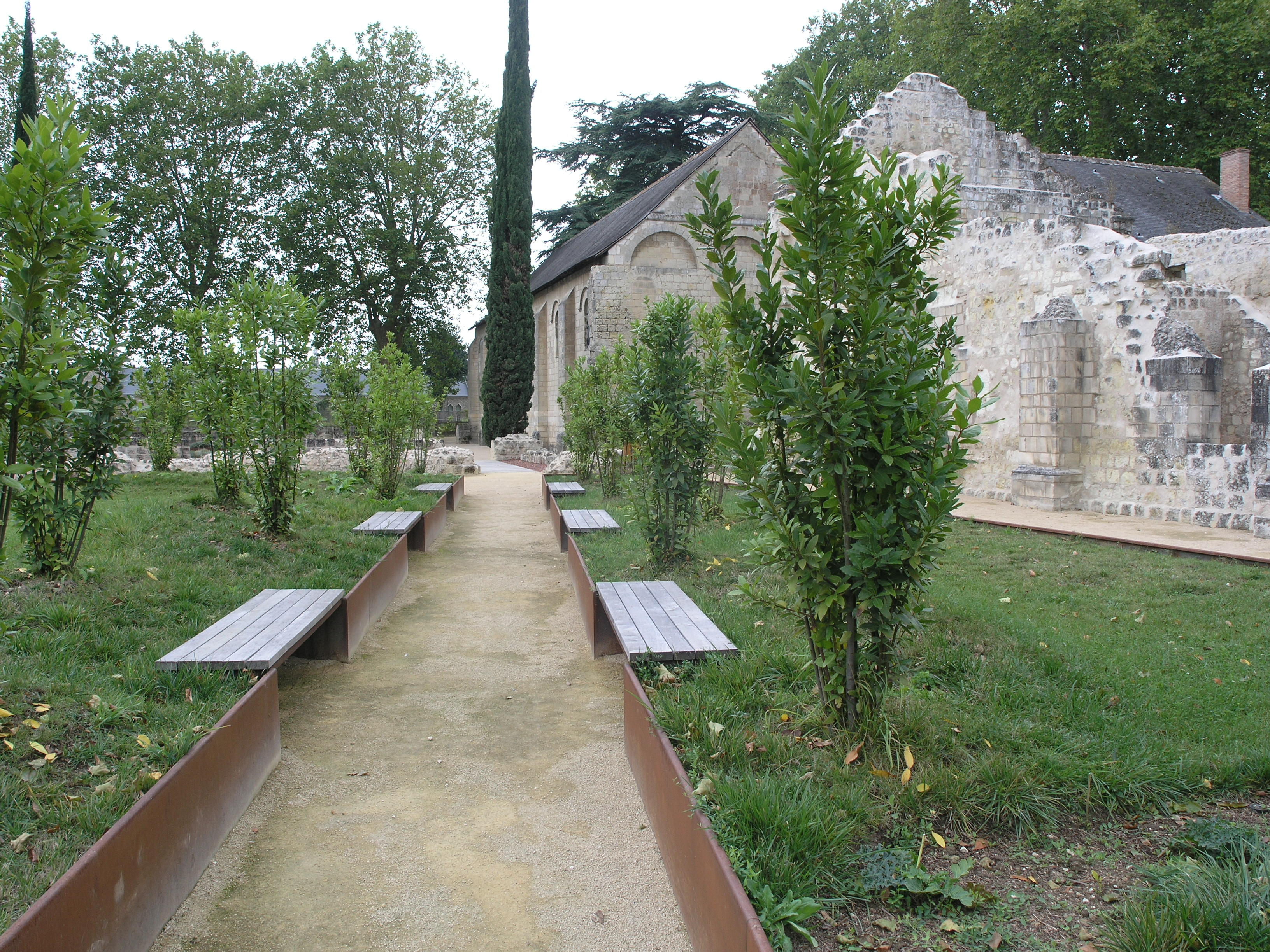 Garten der Prieuré, Metallstreifen kennzeichnen die Grundmauern des ehemaligen Klosters